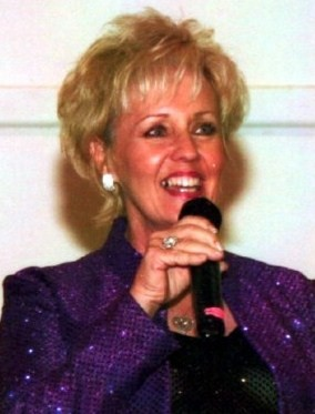 Gayla Earlene